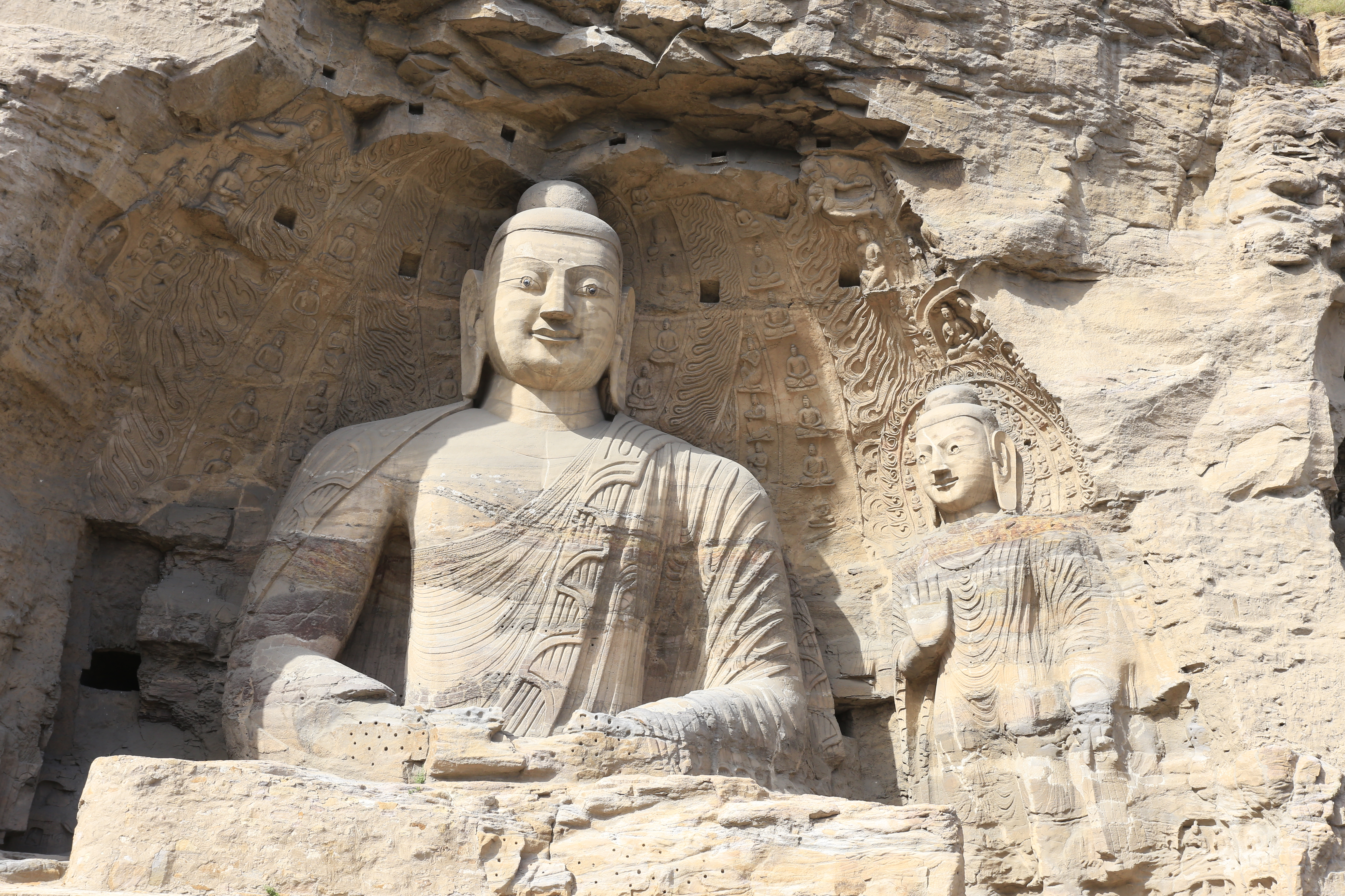 大同云冈石窟—— 第20窟